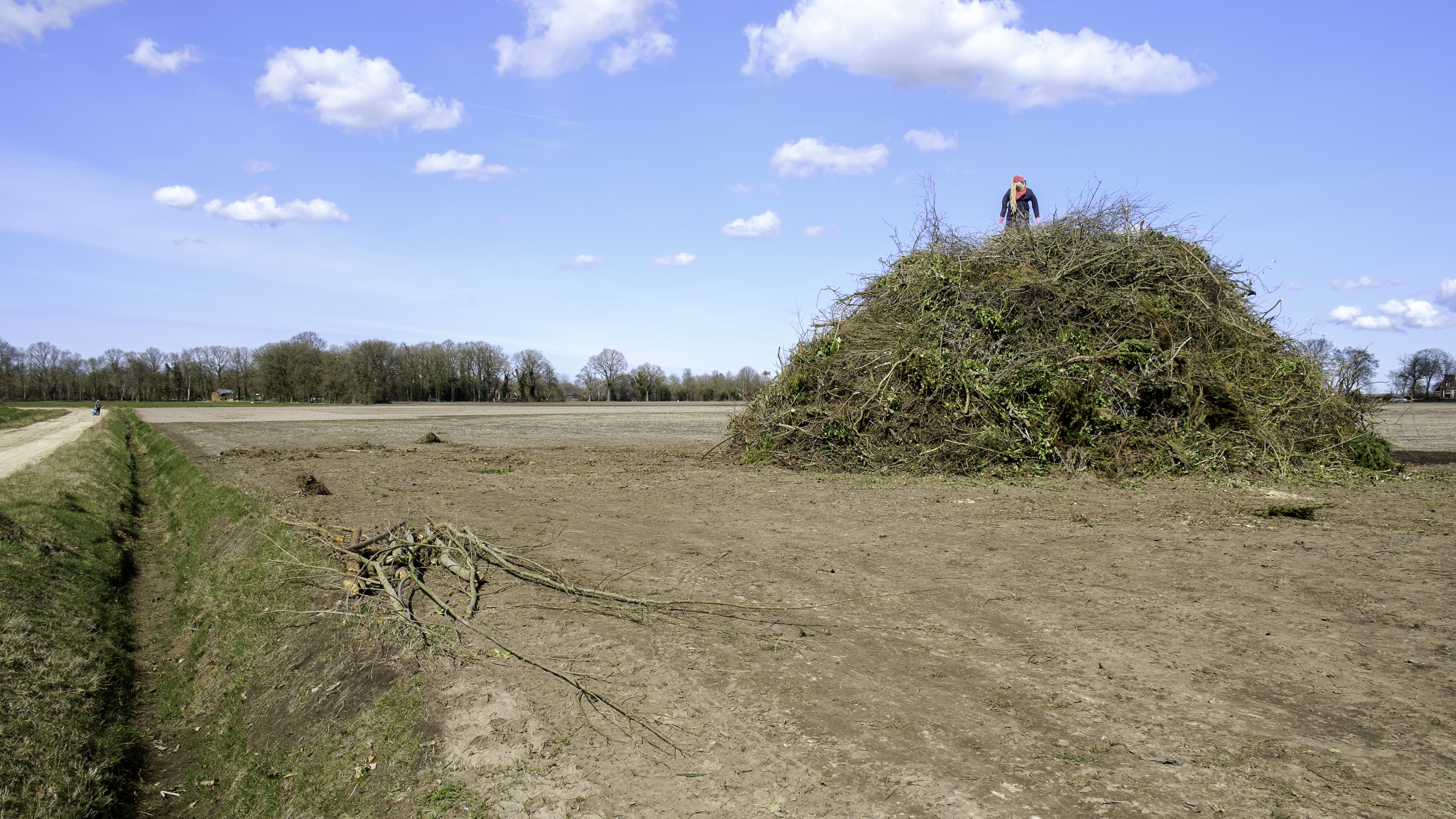 Paasbult Noordlaren